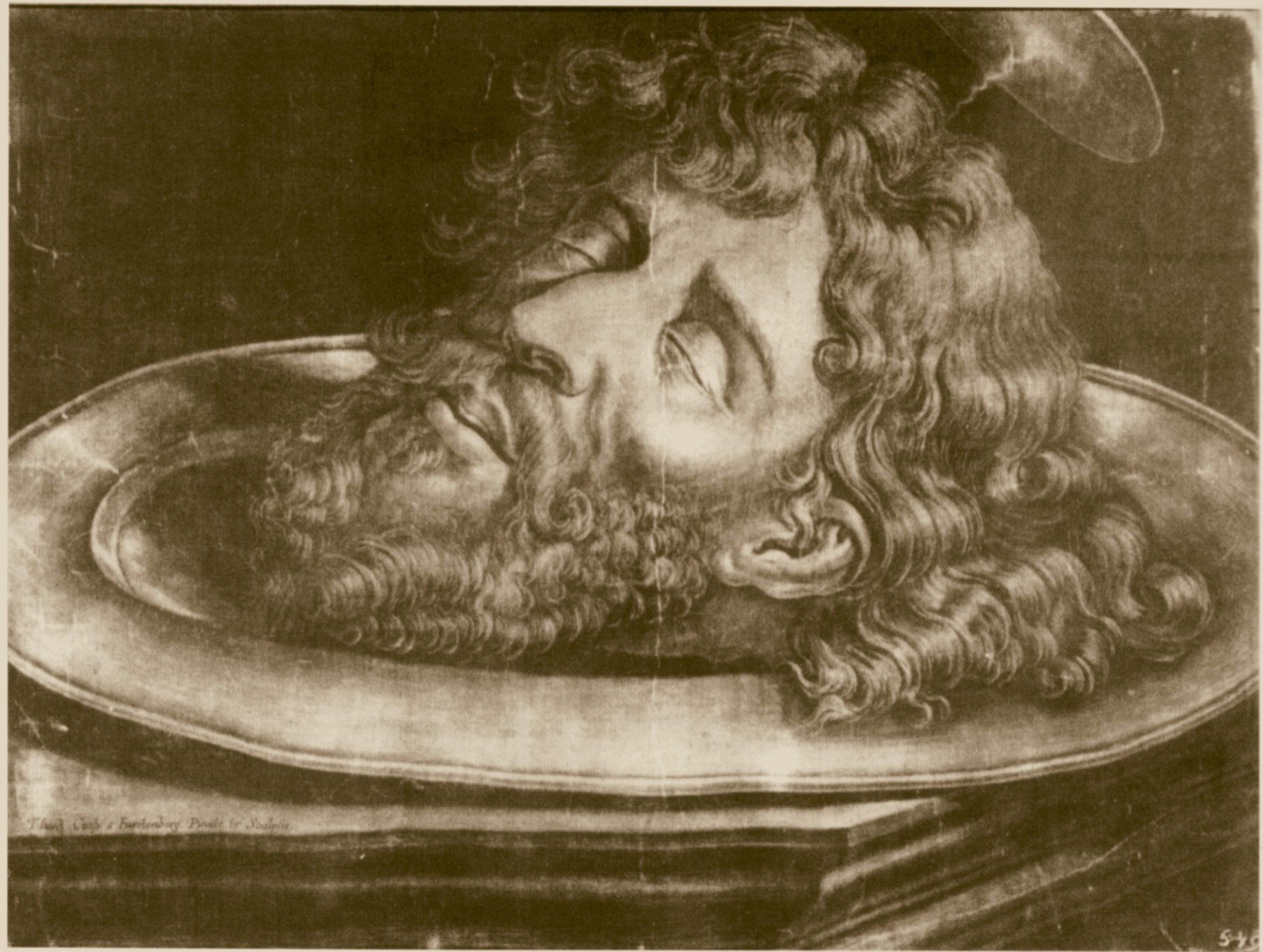 Kopf Johannes des Täufers (Schabkunstblatt Mitte des 17. Jahrhunderts von Caspar Dietrich von Fürstenberg)